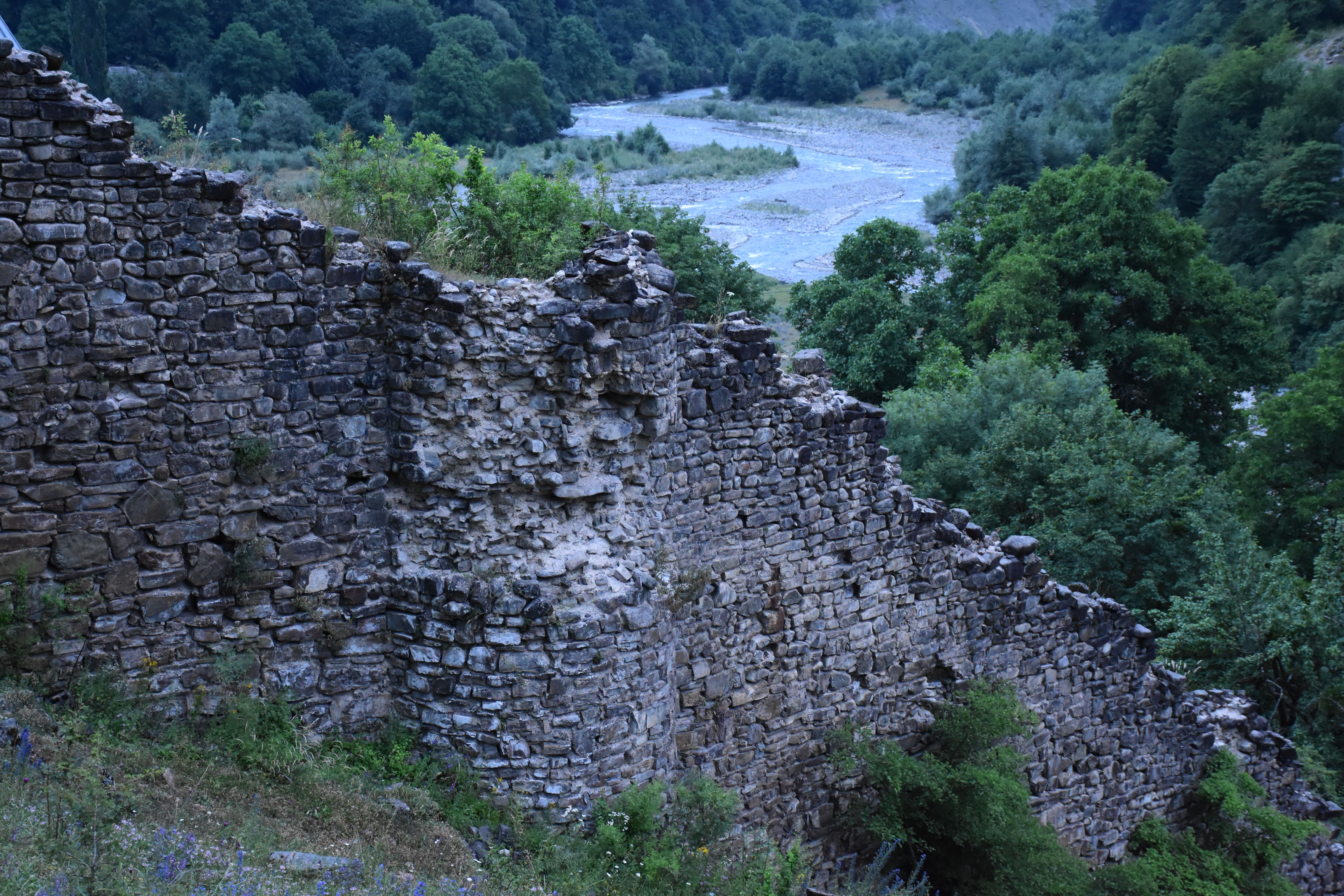 გალავანი საცხოვრებელი კოშკით